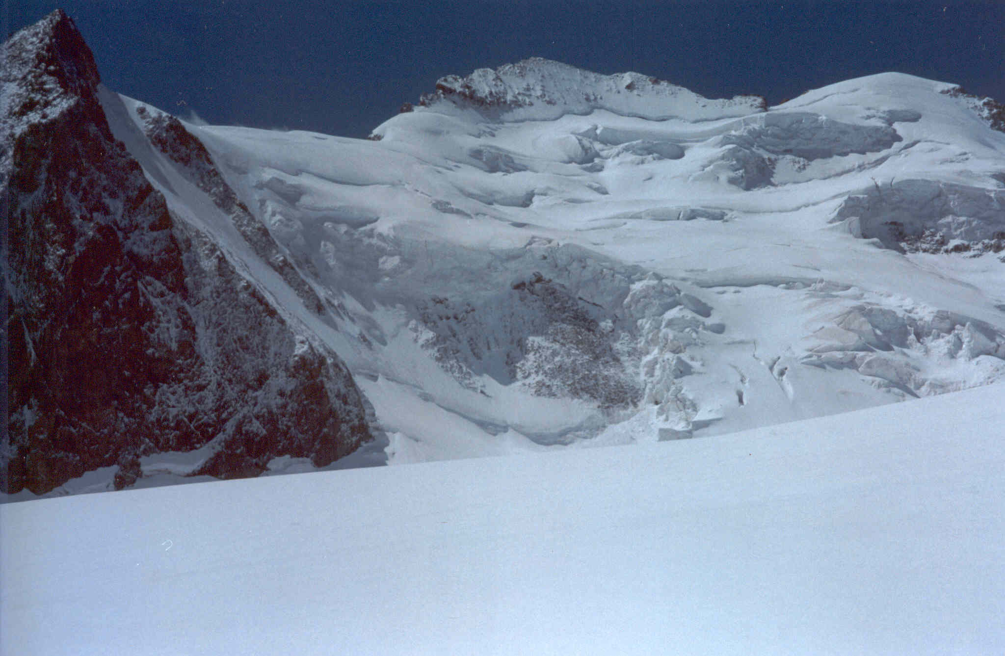 Vista della vetta della Barre des Ecrins